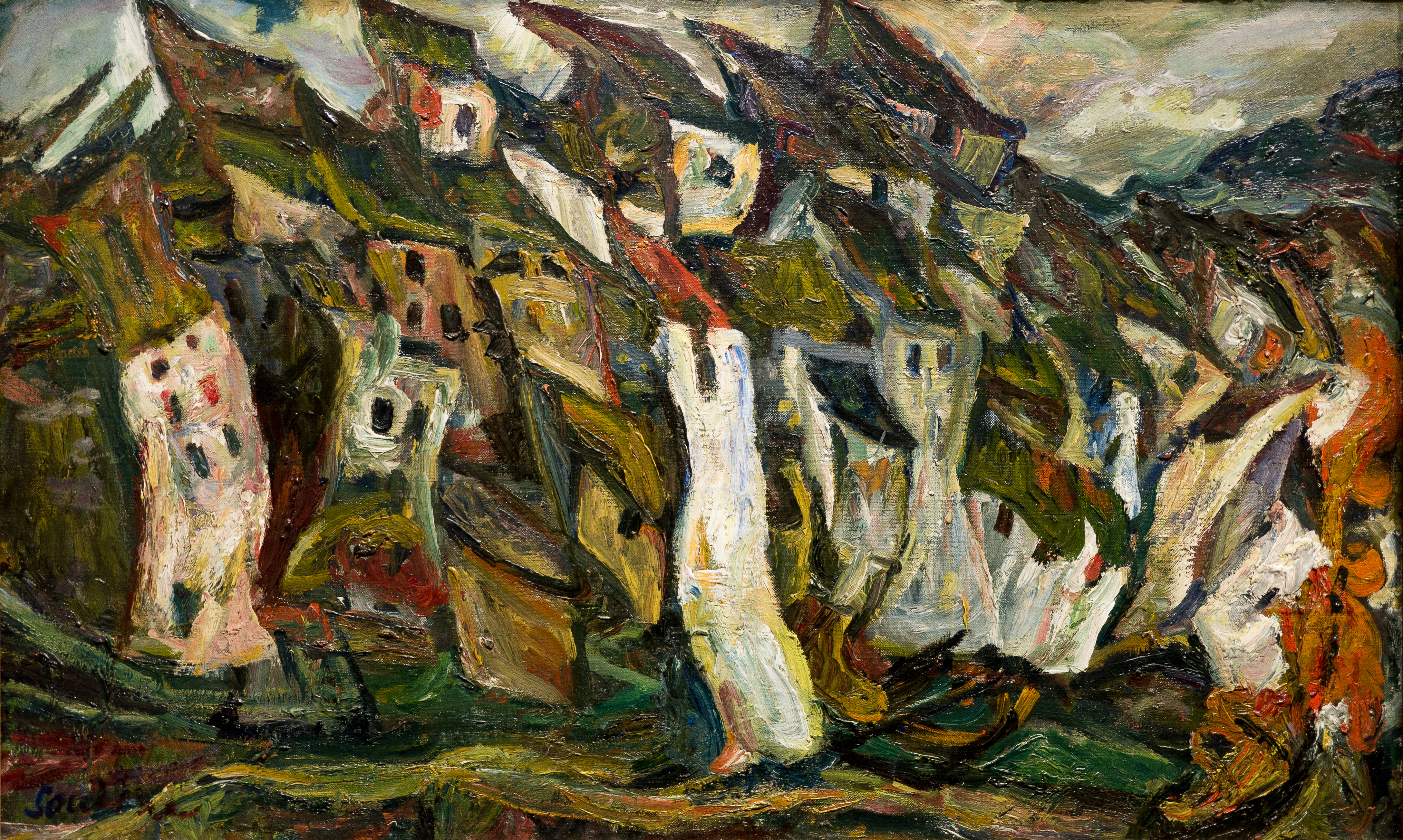 Chaïm Soutine (1893 - 1943) Coll. Jean Walter et Paul Guillaume, Musée de l'Orangerie, Paris